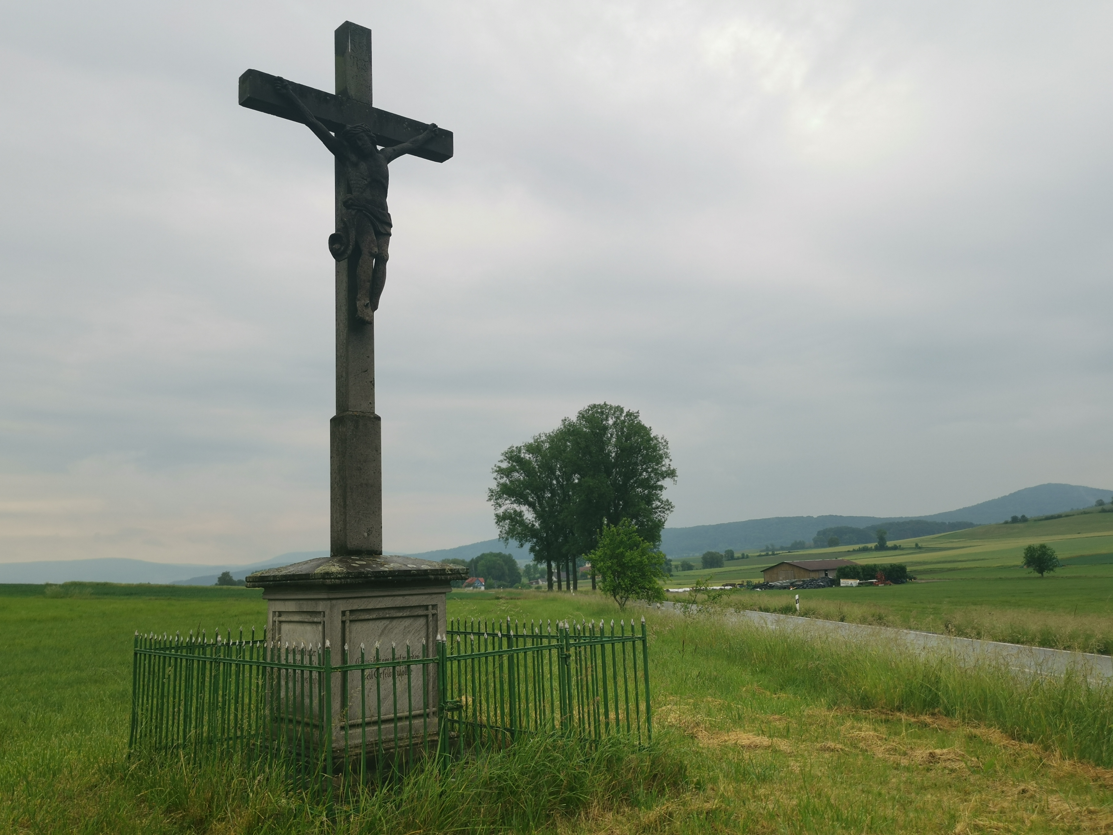 Wegekreuz in Ufhausen Ecke Geisaer Straße/L3380